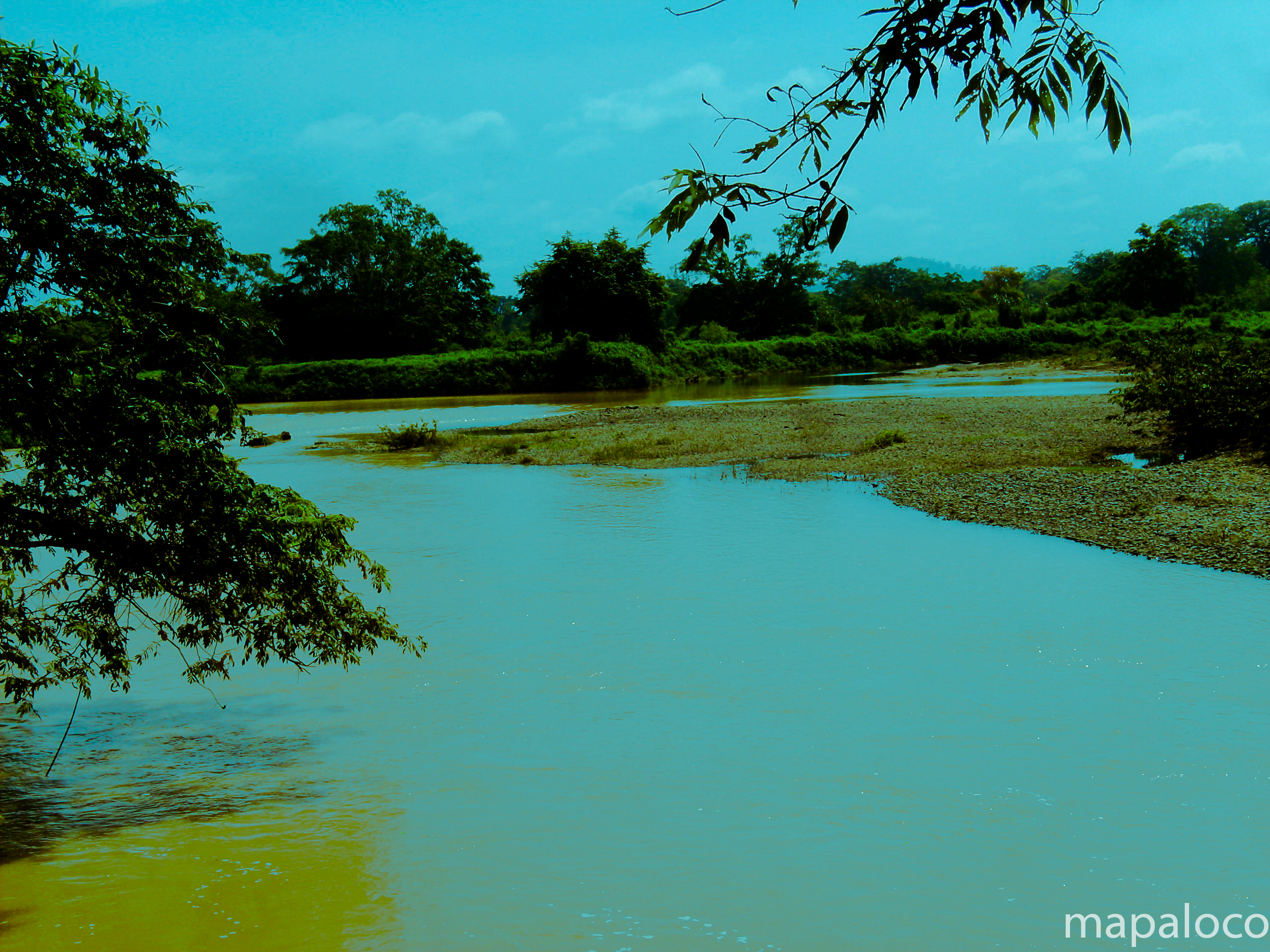 Confluencia de los Rios LaBu y Prinzapolka.